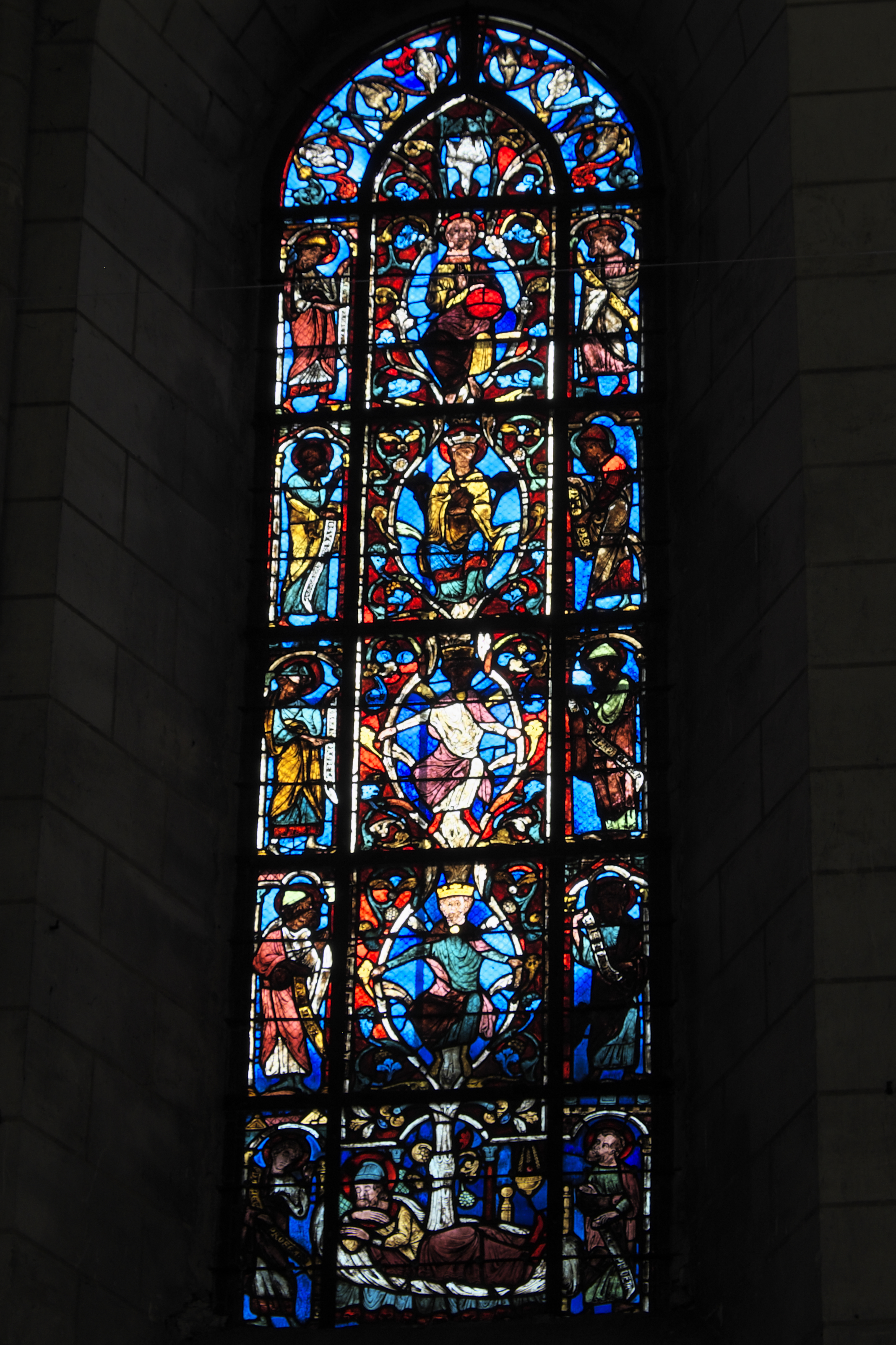 Katholische Pfarrkirche Saint-Vincent-Saint-Germain in Saint-Germain-lès-Corbeil im Département Essonne (Region Île-de-France/Frankreich), Bleiglasfenster aus dem 13. Jahrhundert im Chor; Darstellung: Wurzel Jesse